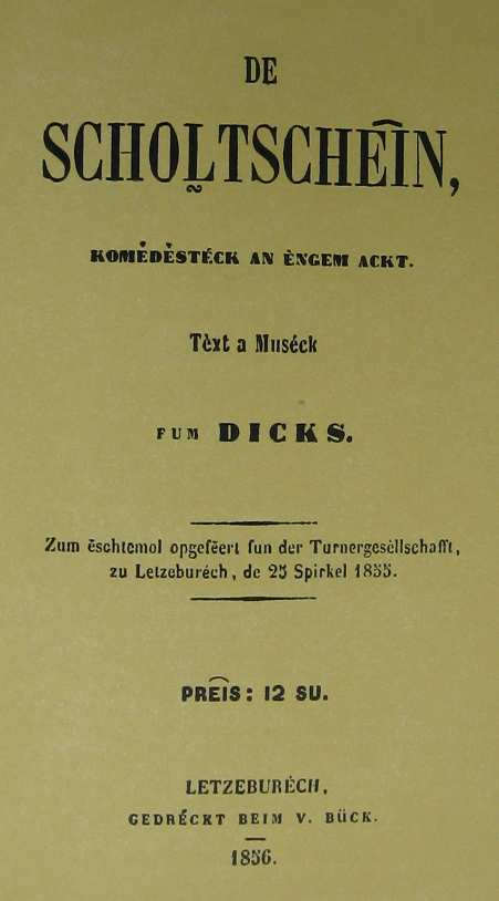 Titelblat vum Dicks (1823-1891) sengem Kaméidistéck De Scholtscheîn. Gedréckt beim V. Bück 1856.